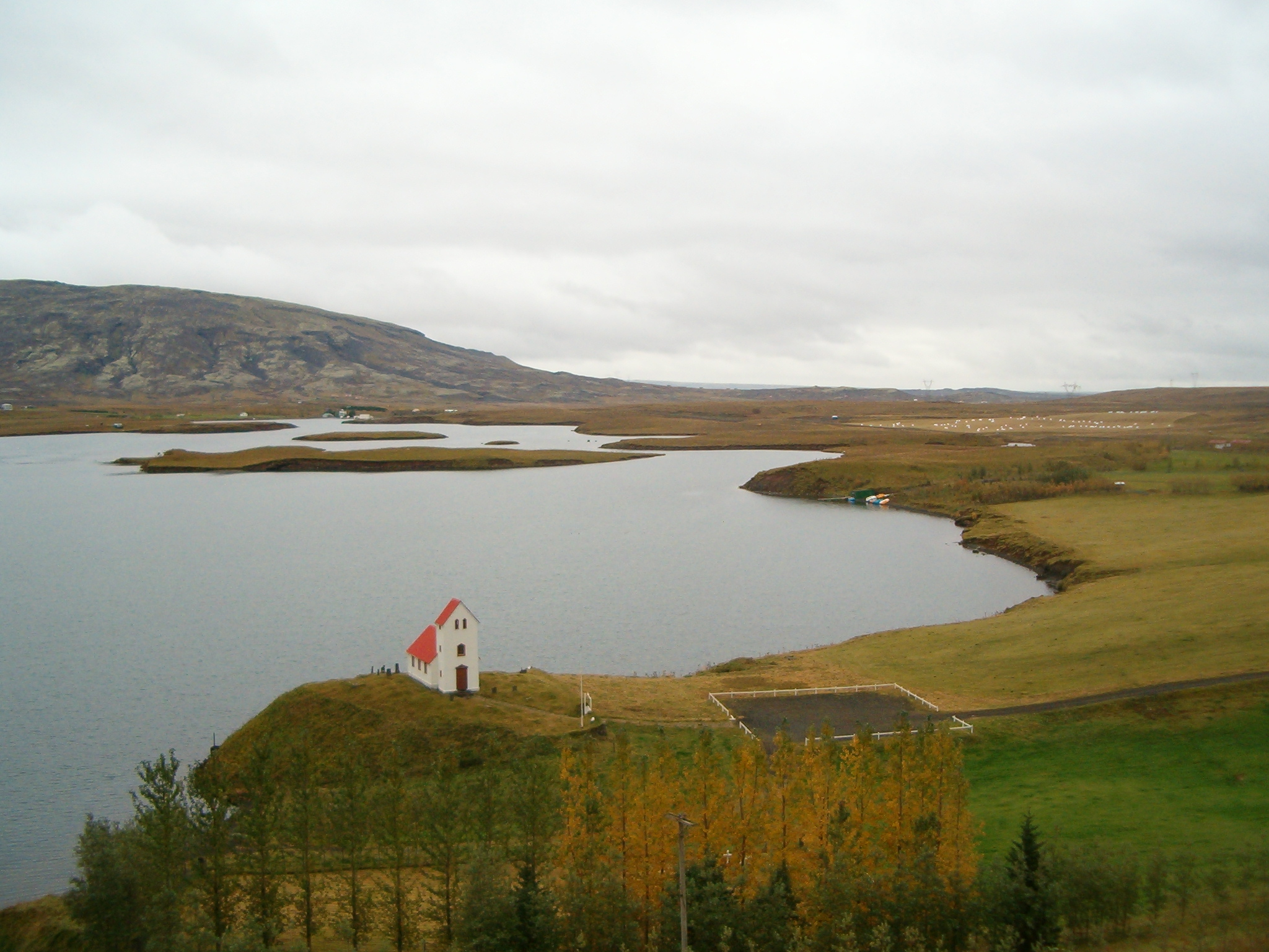 Het Úlfljótsvatn, een meer in het zuiden van IJsland.